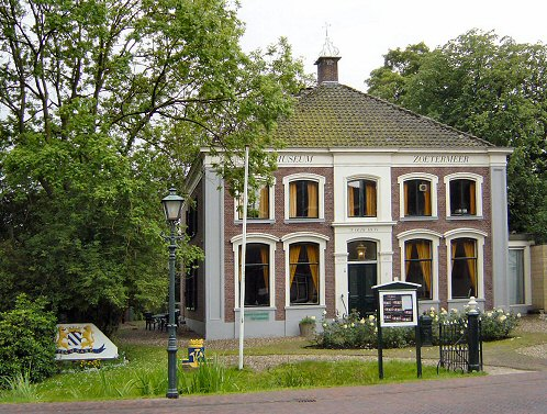 't Oude Huis (gemeentemuseum) te Zoetermeer. Eigen foto Gebruiker:Markv, juli 2004